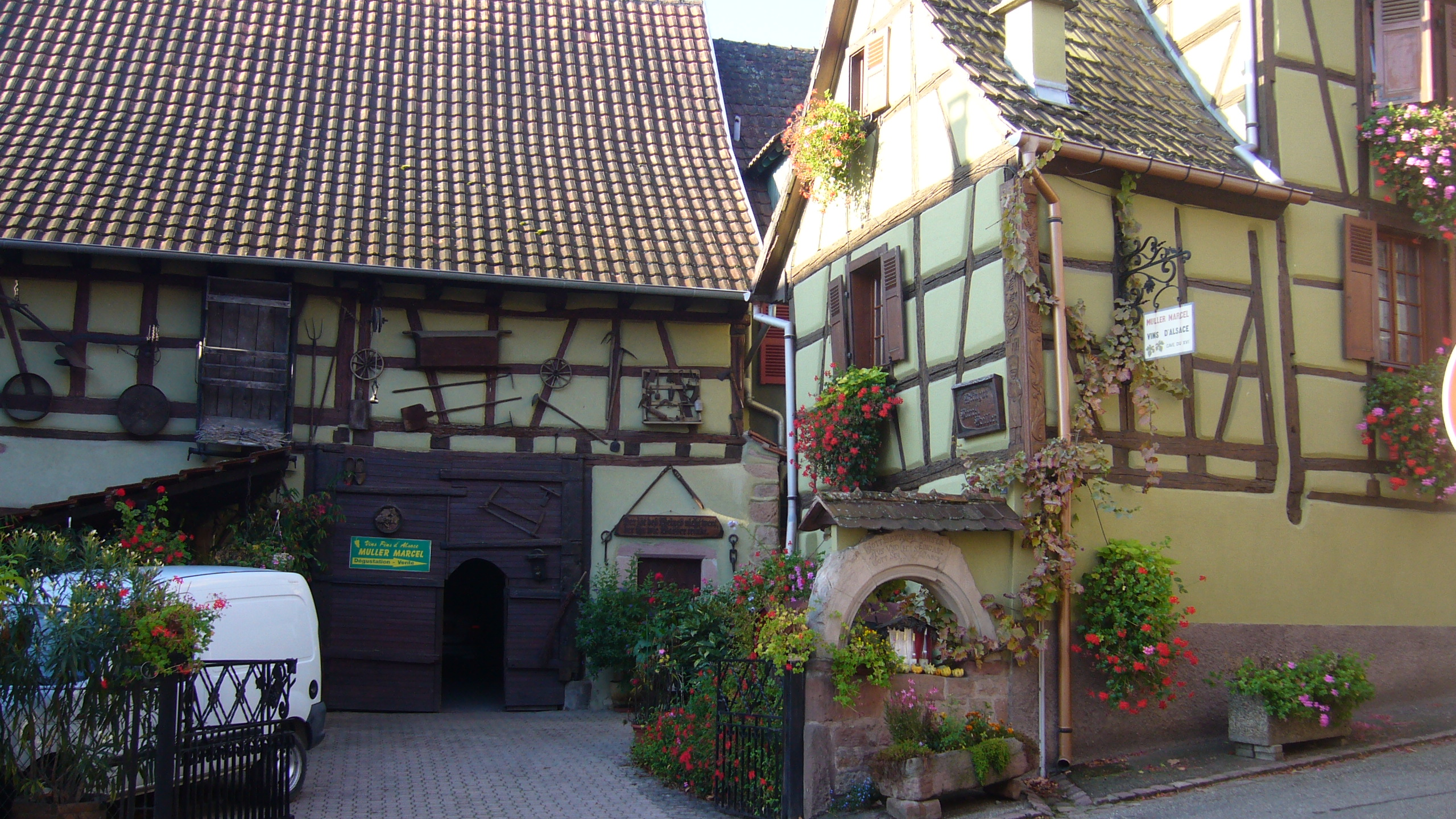 Saint-Hippolyte 035.JPG, Ancienne ferme située au 25 rue Saint-Fulrade à Saint-Hippolyte